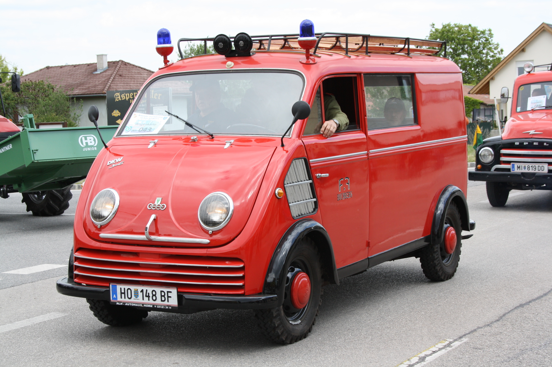 Einsatzfahrzeug der FF Buchberg am Kamp